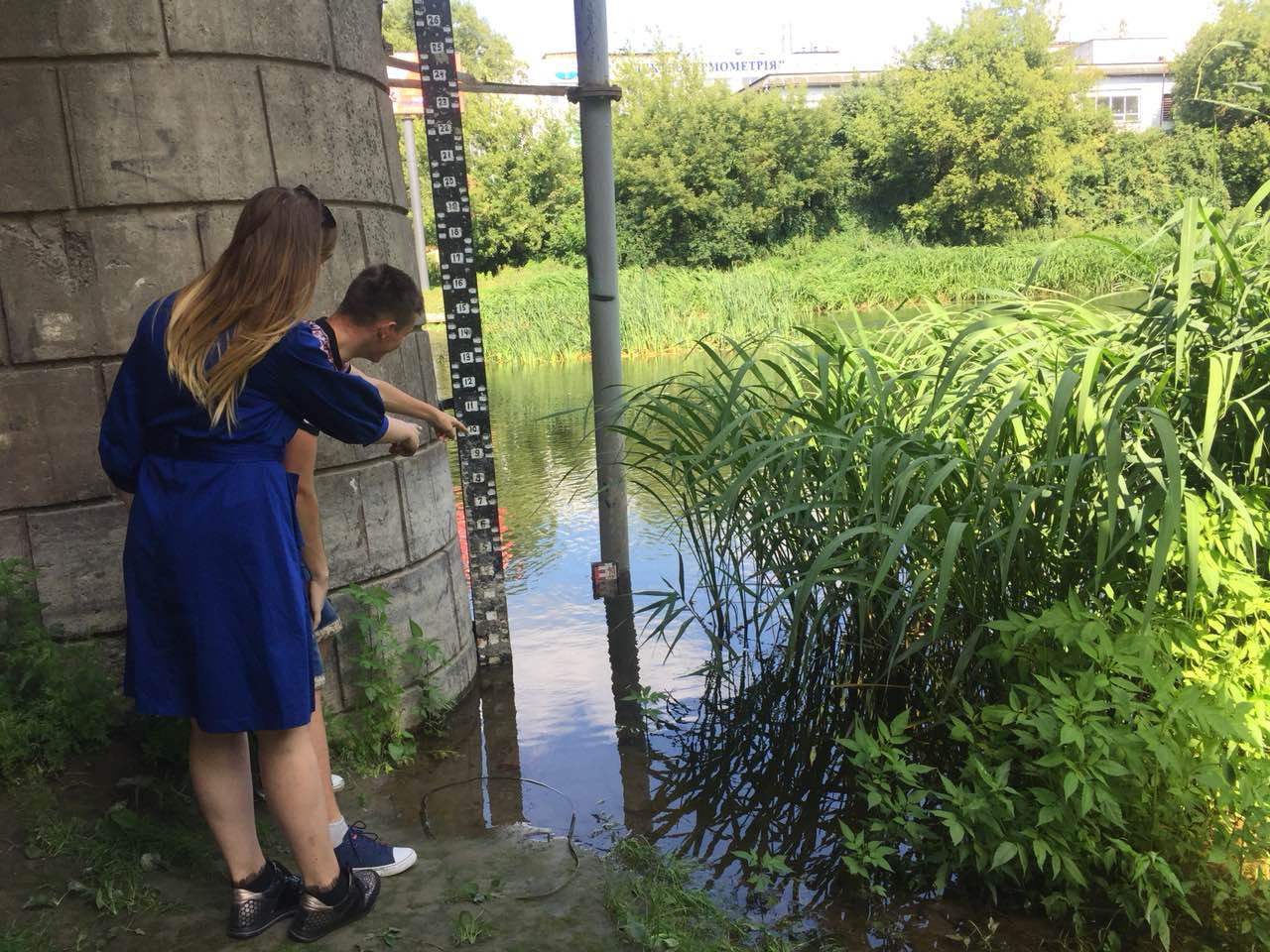 Збір показників рівня води студентами на гідрологічному посту р. Стир - м. Луцьк, 2018р.